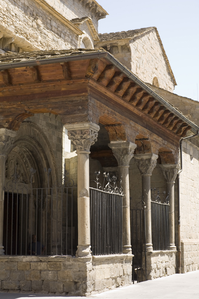 unidentified Spain